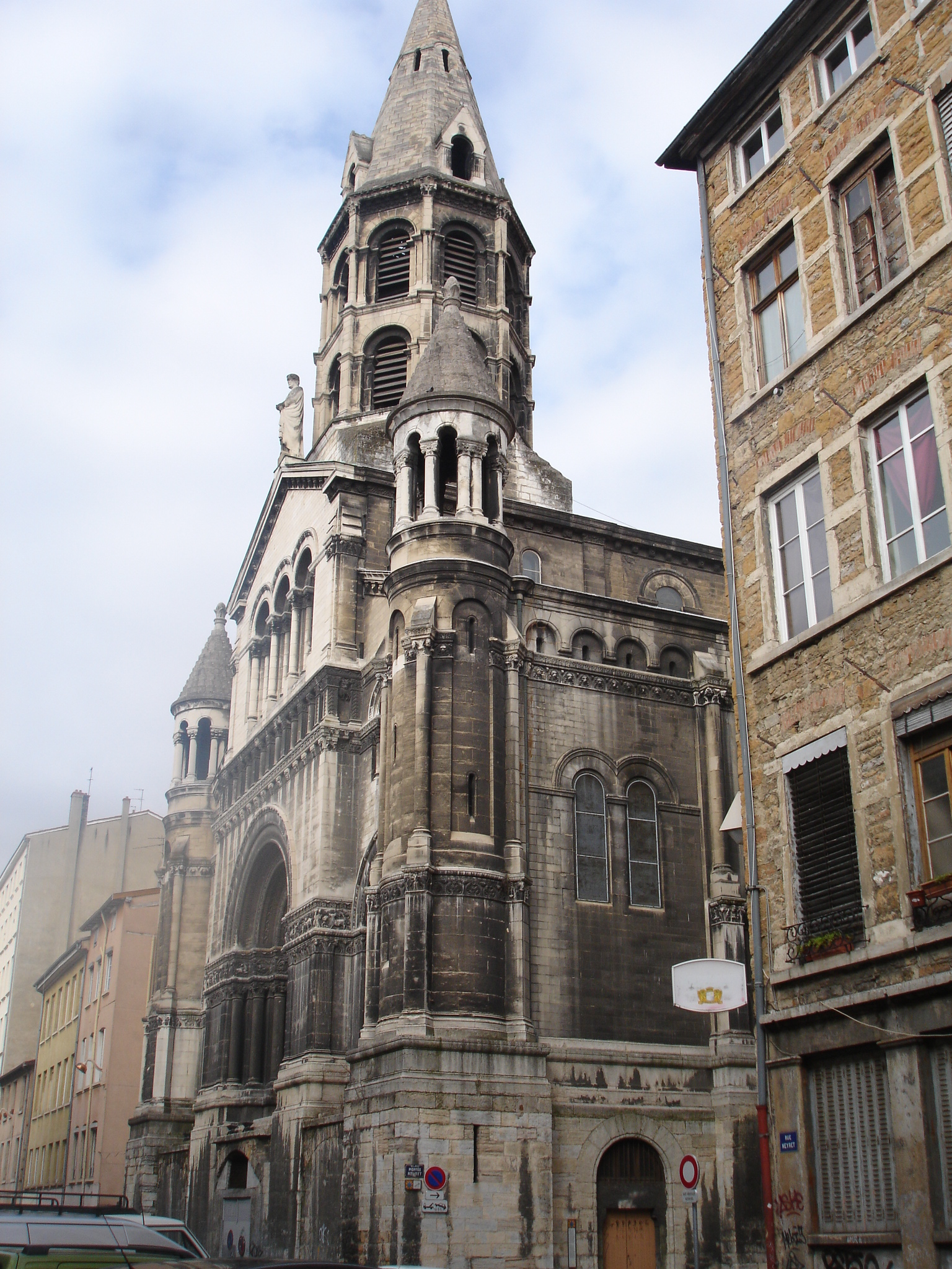 Lyon Les Pentes : église du bon pasteur